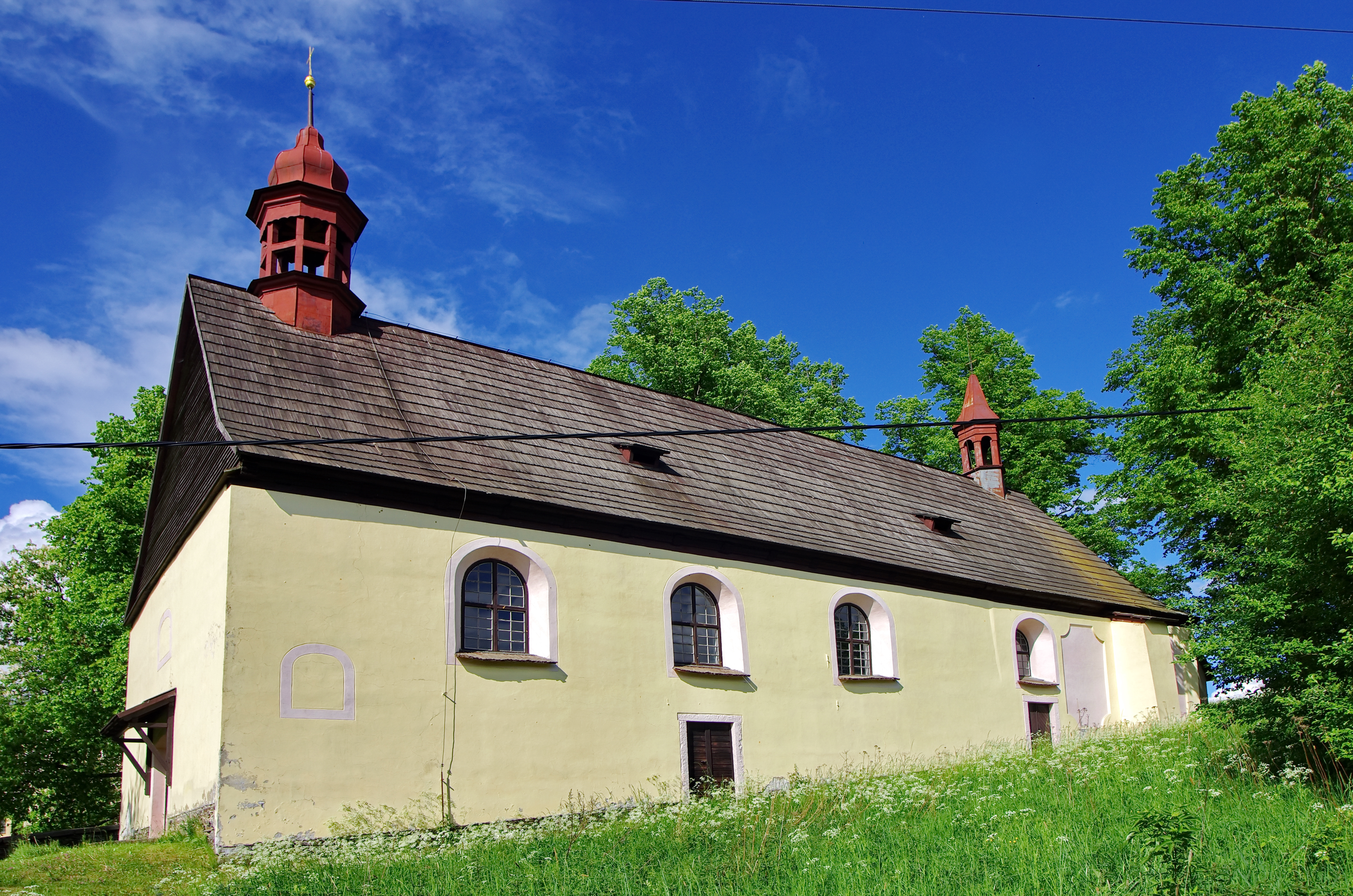 Sněžná u Kraslic - kostel svatého Jakuba Většího, okres Sokolov